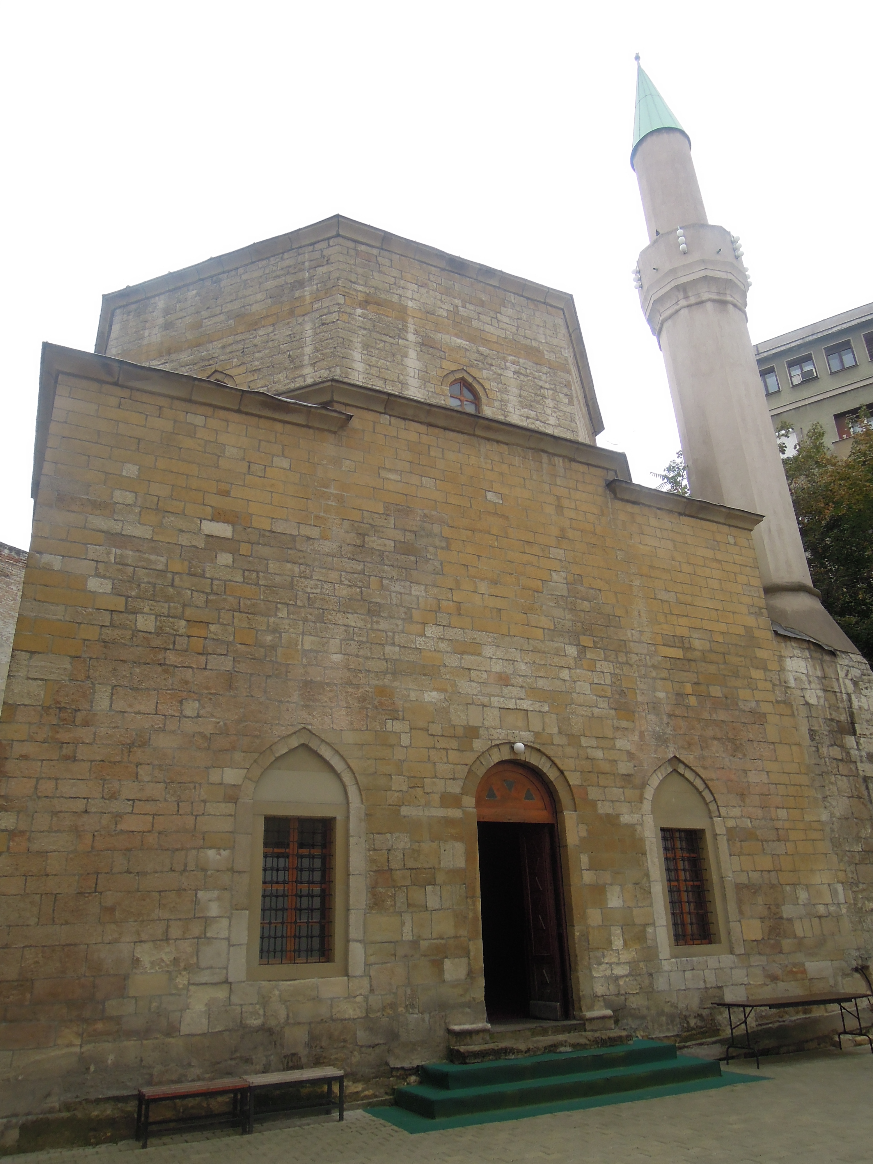 Бајракли џамија је саграђена око 1575. године, као једна од 273 џамија, колико их је у турско доба било у Београду.